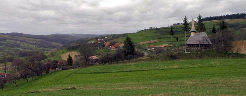 Biserica de lemn din Tusa, perspectivă peste cimitir.